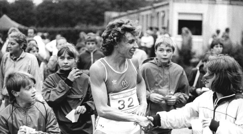 Marita Koch ADN-ZB Kluge 21.8.86 Berlin: DVfL-Sportfest - Die Leichtathletik-Elite der DDR verabschiedete sich am 20.8.86 vor ihrer Abreise zu den Europameisterschaften in Stuttgart mit einem Sportfest im Berliner Sportforum. Nach ihrem Sieg über 200 m wurde die Rostockerin Marita Koch von begeisterten Jugendlichen umringt.